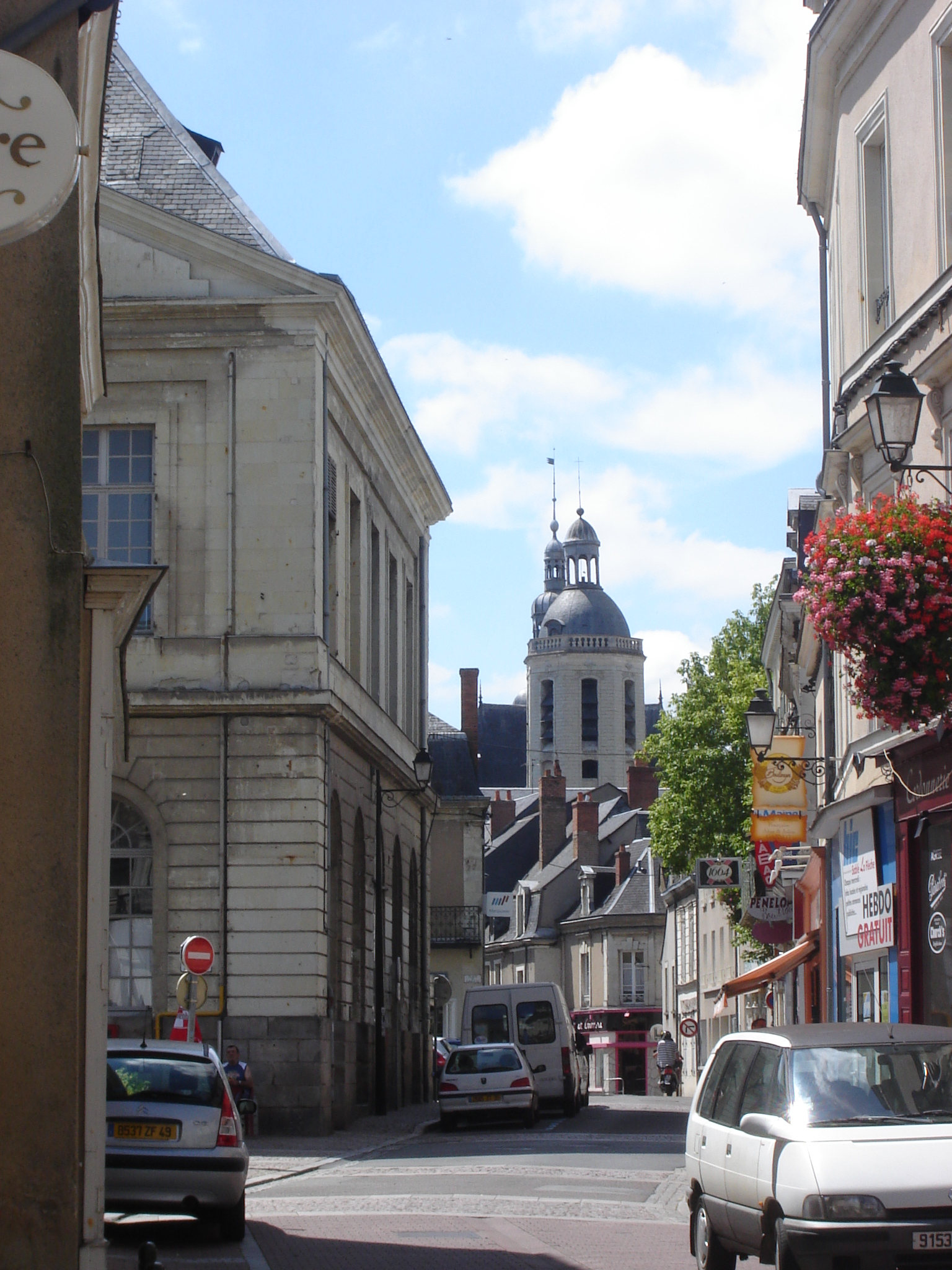 Vue de la rue de la Dauversière à La Flèche